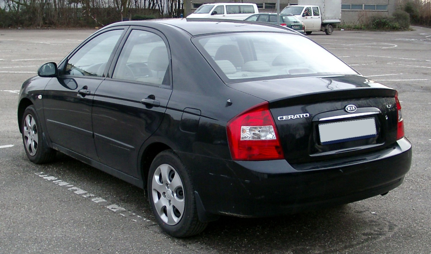 Kia Cerato